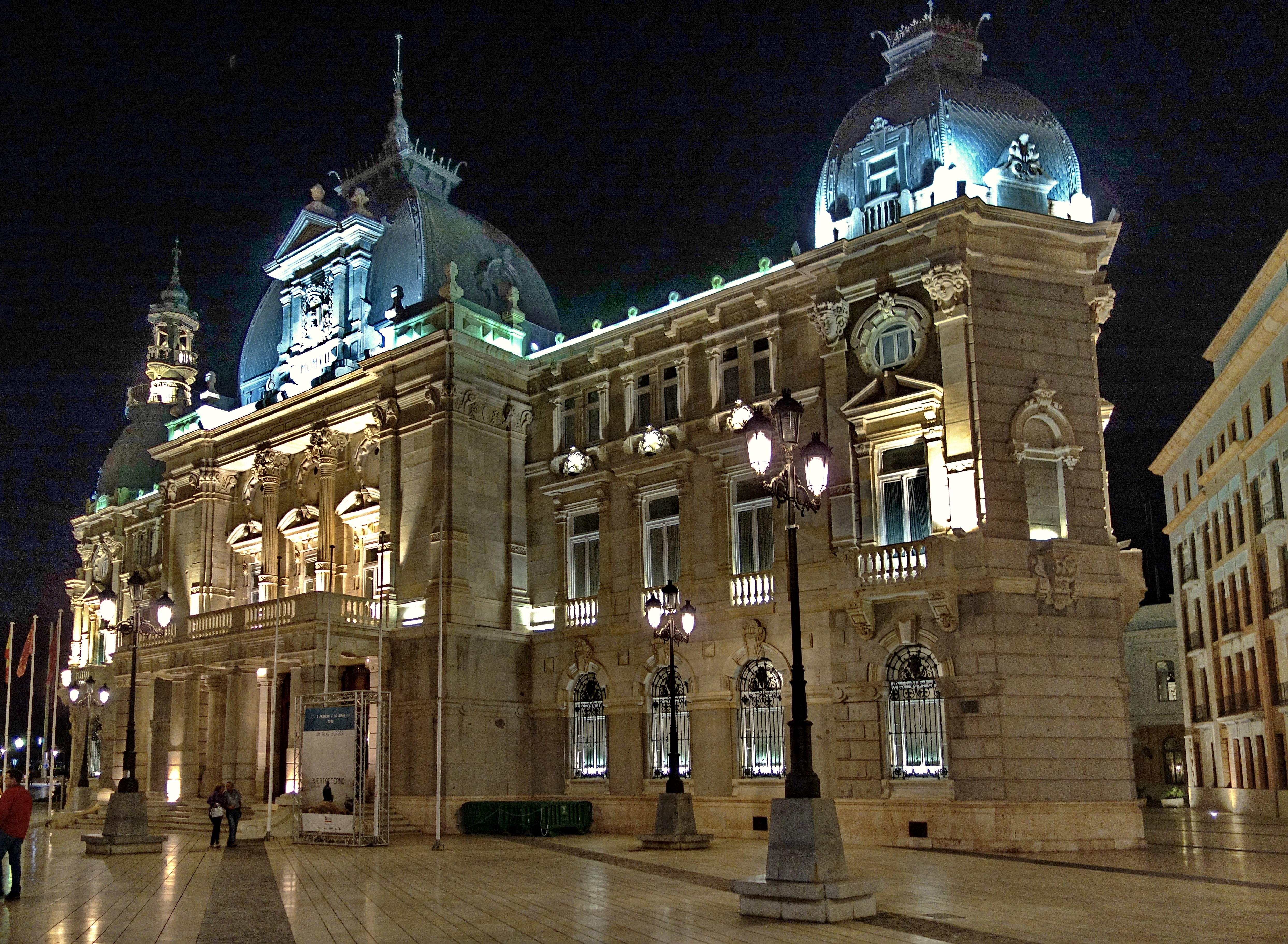 Palacio consistorial de Cartagena, España.